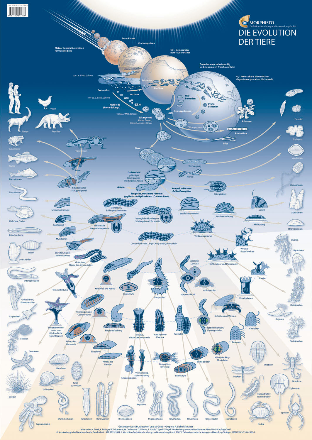 Die Evolution der Tiere: Das Poster zeigt im oberen Teil Entstehung der Erde und Lebens mit der Verzweigung in die Hauptevolutionslinien des Tierreiches. Pilze, Pflanzen, Algen (Protoctista) und Bakterien sind im oberen Bereich als Seitenzweige der frühen Evolution dargestellt. Die Evolution der Tiere geht von vielzelligen Organismen aus, die durch interne Kompartimentierung und Bildung von Kollagen als formstabilisierendes Material entstanden sind, die sogenannten Gallertoide. Diese sind von einem cilienbesetzten Kanalsystem durchzogen. Ausgehend von diesen frühen Tieren entwickelten sich mehrere Hauptlinien, die sich schließlich in die weiteren Hauptevolutionslinien differenzierten. Namensnennung: Manfred Grasshoff, Michael Gudo, Tareq Syed